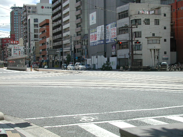 広島電鉄十日市町電停。ポイント操作塔と土橋方面電停を入れて。